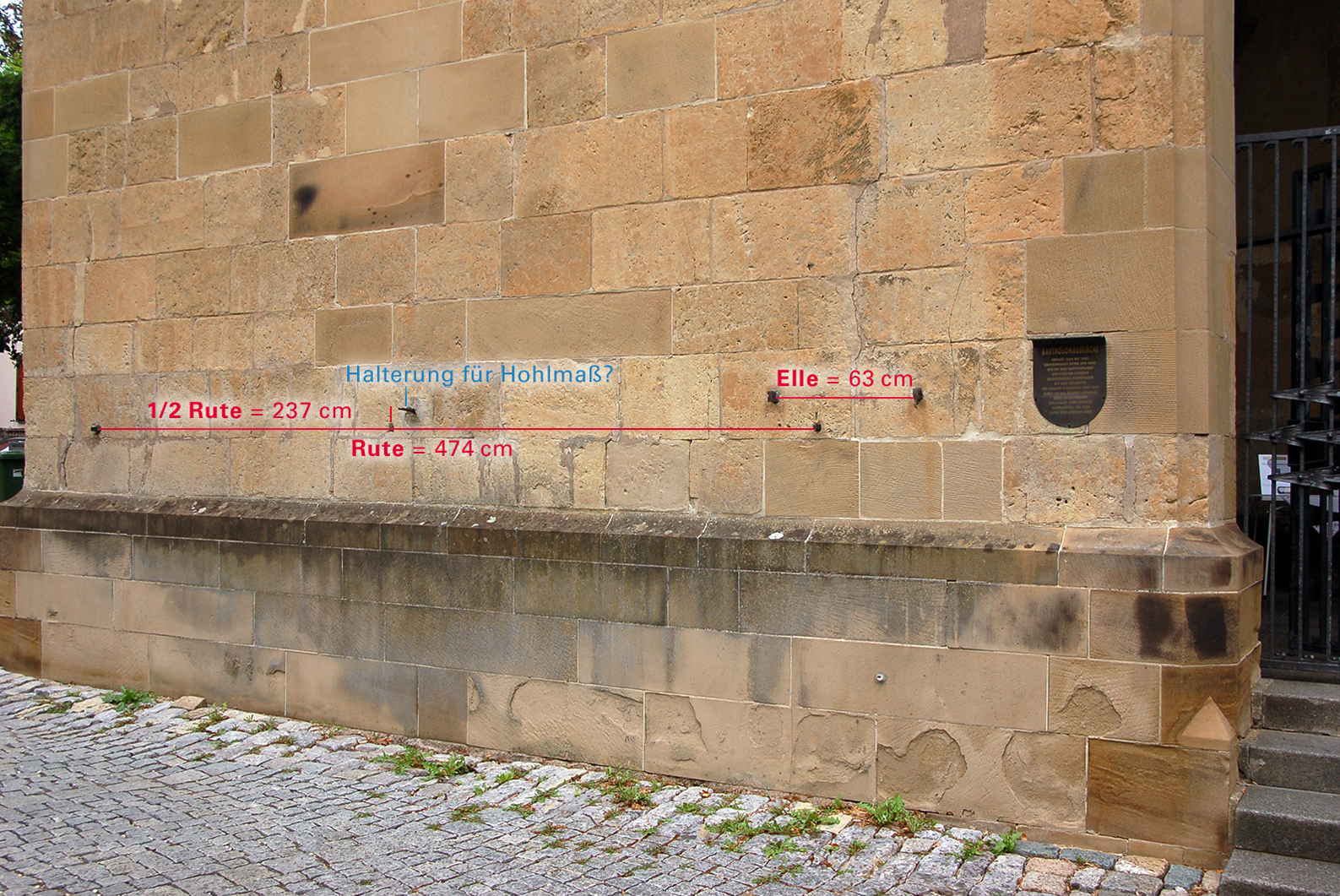 Grüninger Maße am Hochwachtturm der Bartholomäuskirche: Elle = 63 cm, Rute = 474 cm, dabei eine gelochte Halterung, vermutlich für ein Hohlmaß. Die ursprünglich reichsstädtischen Maße aus dem 13. Jhdt. behielten ihre Gültigkeit bis zur württembergischen Normung durch Herzog Christoph (1557). Da in der Stadt und auf der Flur alles mit der eigenen Rute vermessen war, hielten die Grüninger jedoch noch lange an ihr fest.